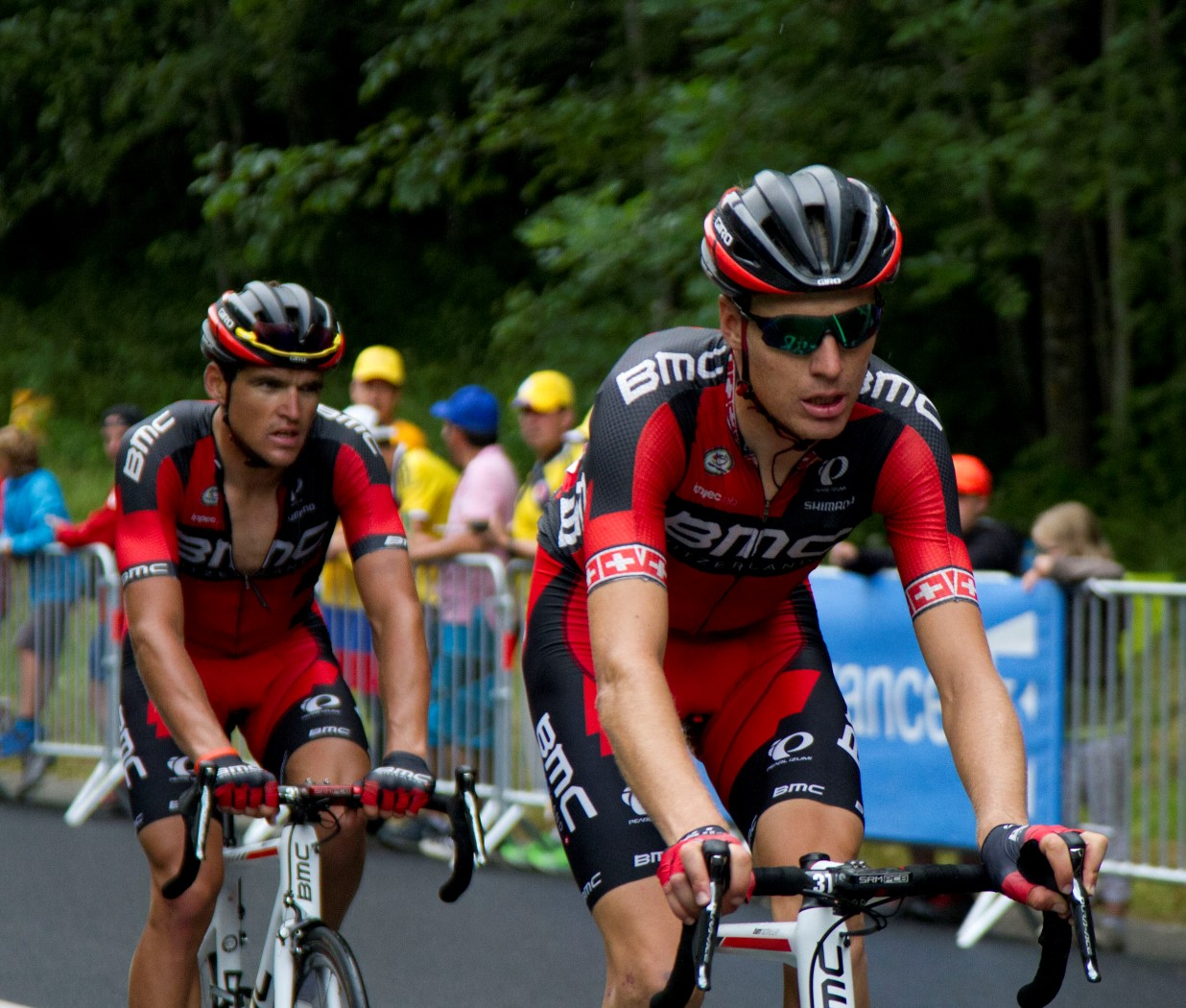 4109 van avermaet schär